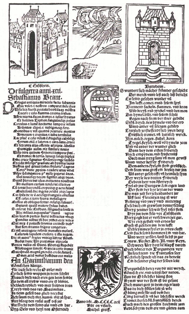 Lateinisch-deutsches Flugblatt von 1492 über den "Donnerstein von Ensisheim", ein Steinmeteorit, der im selben Jahr bei Ensisheim im Elsass niederging. Transcript latin & german